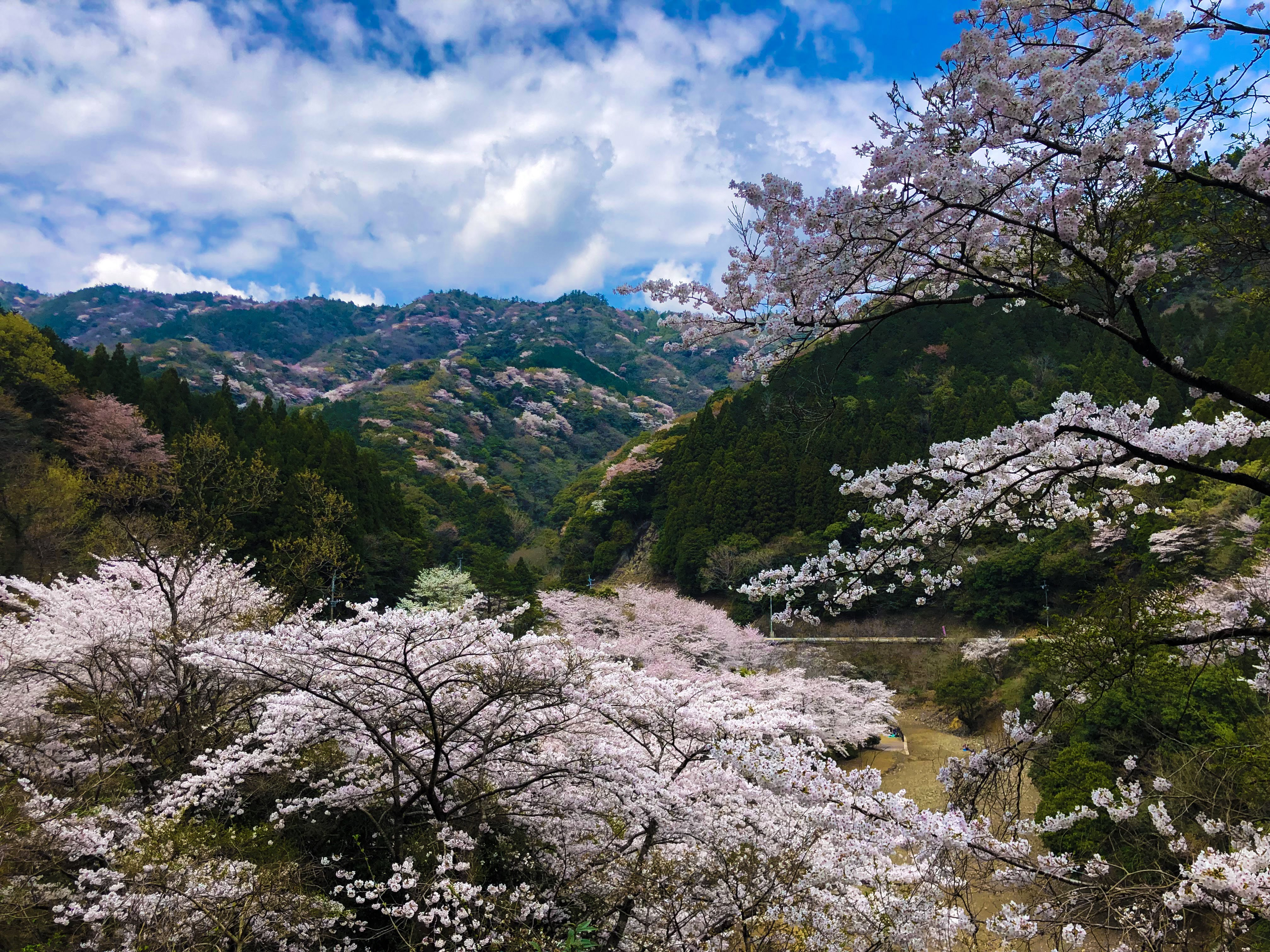 松川のヤマザクラ